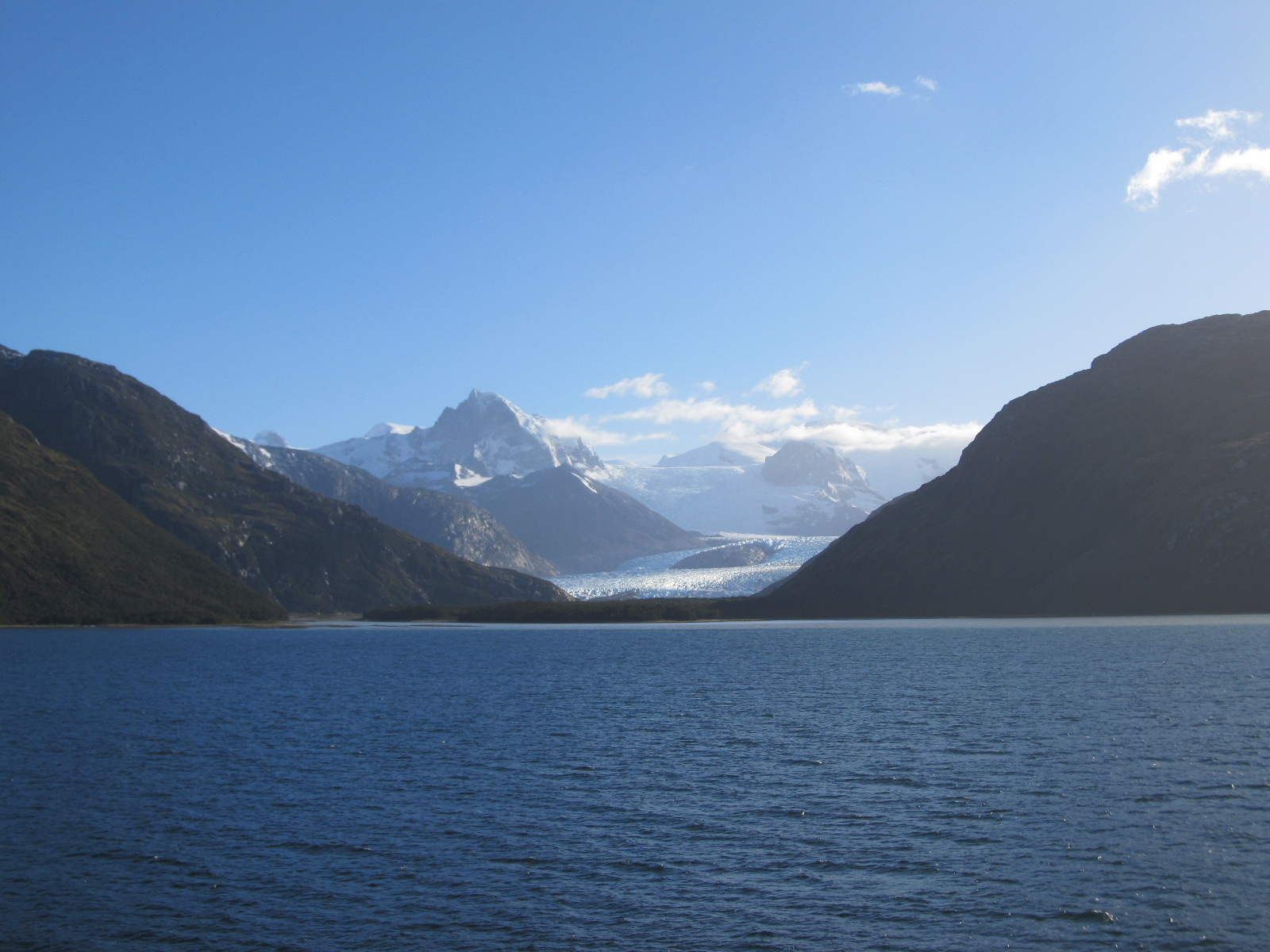 Alemania Glacier, Beagle Channel, Chile.